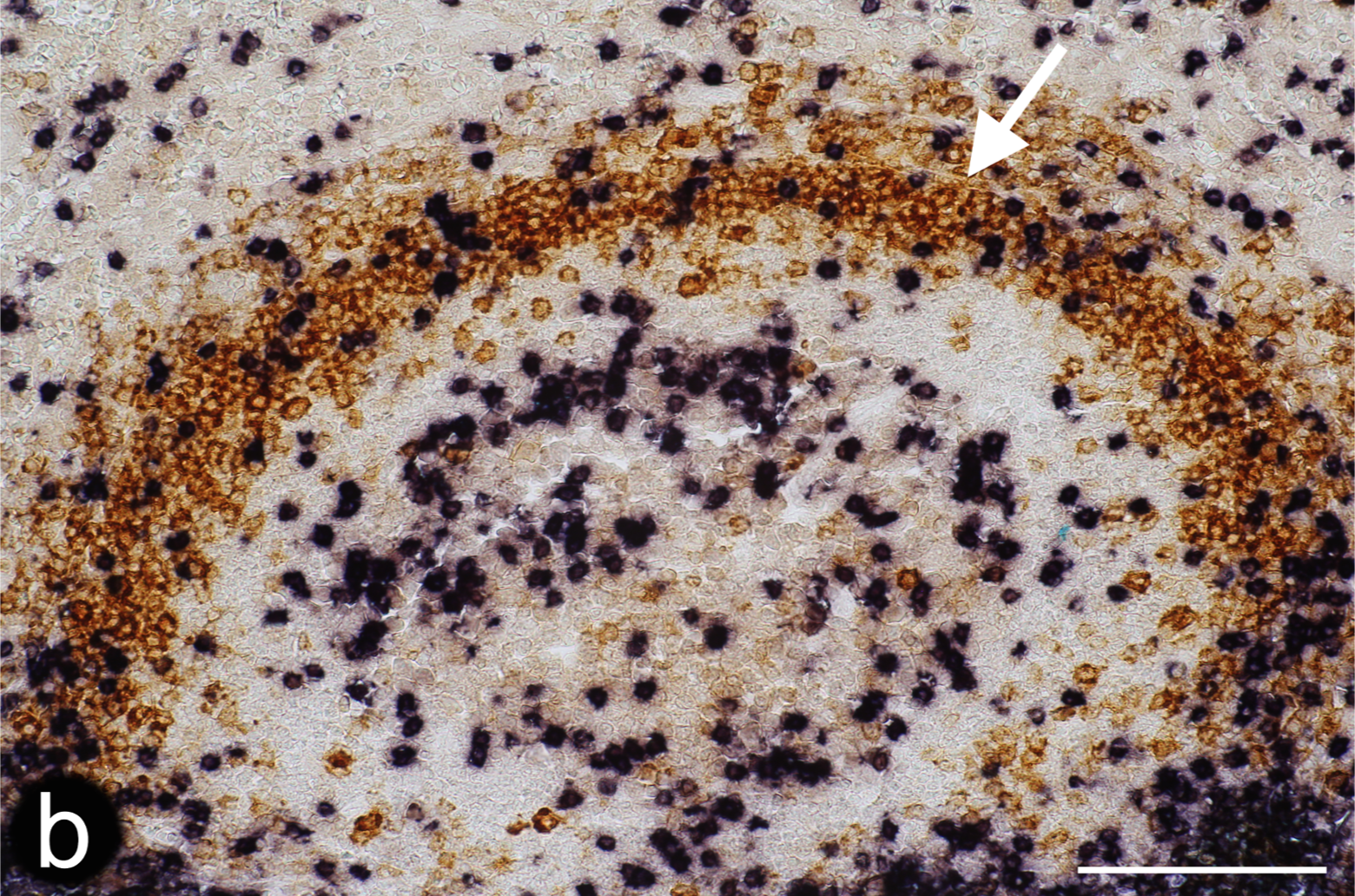 Fig. 6. Localización de una barrera potencial hacia la circulación esplénica abierta en la superficie folicular. (b) Doble tinción para células T CD3+ (azul-negro) y células B CD27+ (marrón) en una sección de parafina. La flecha indica fibras y fibroblastos fuera de las células B más fuertemente teñidas con CD27+, formando una barrera contra la circulación abierta. Barra de escala = 100 μm.